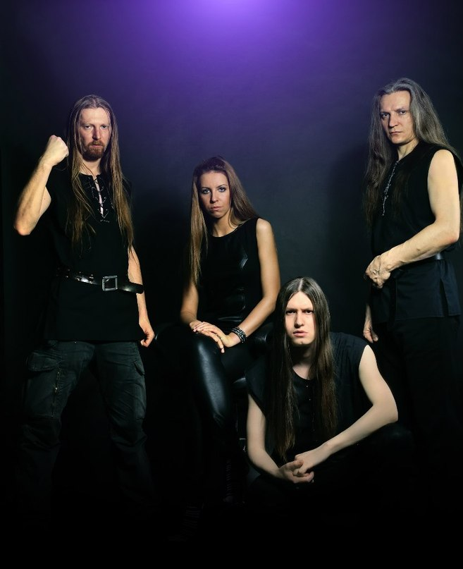 группа Алконост в составе 2012